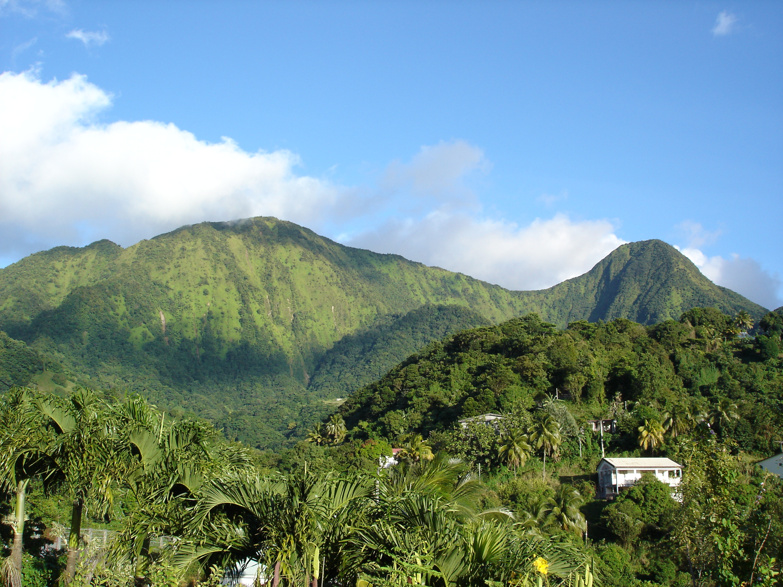 Piton Lacroix en Martinique